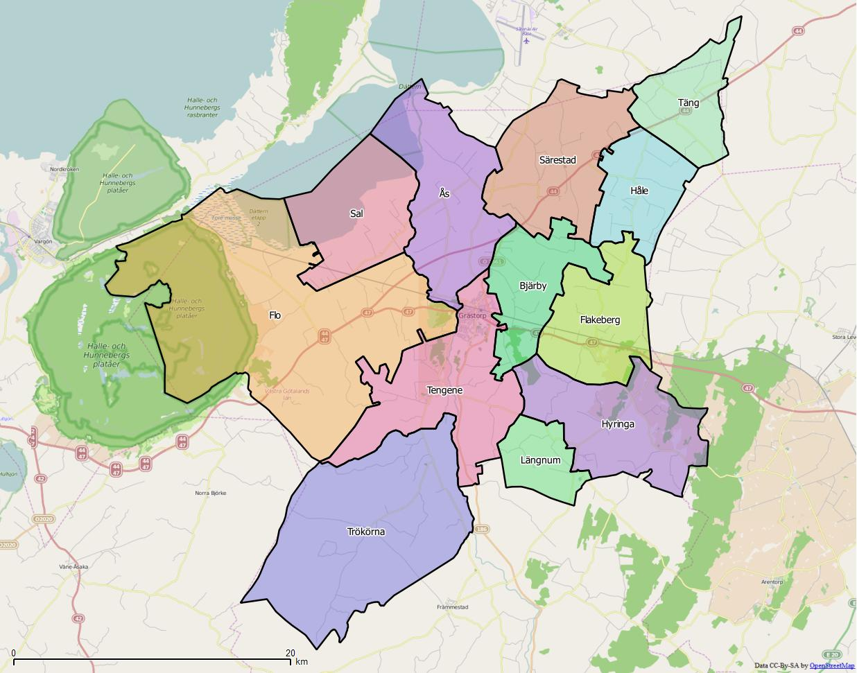 Distriktsindelningen i Grästorps kommun